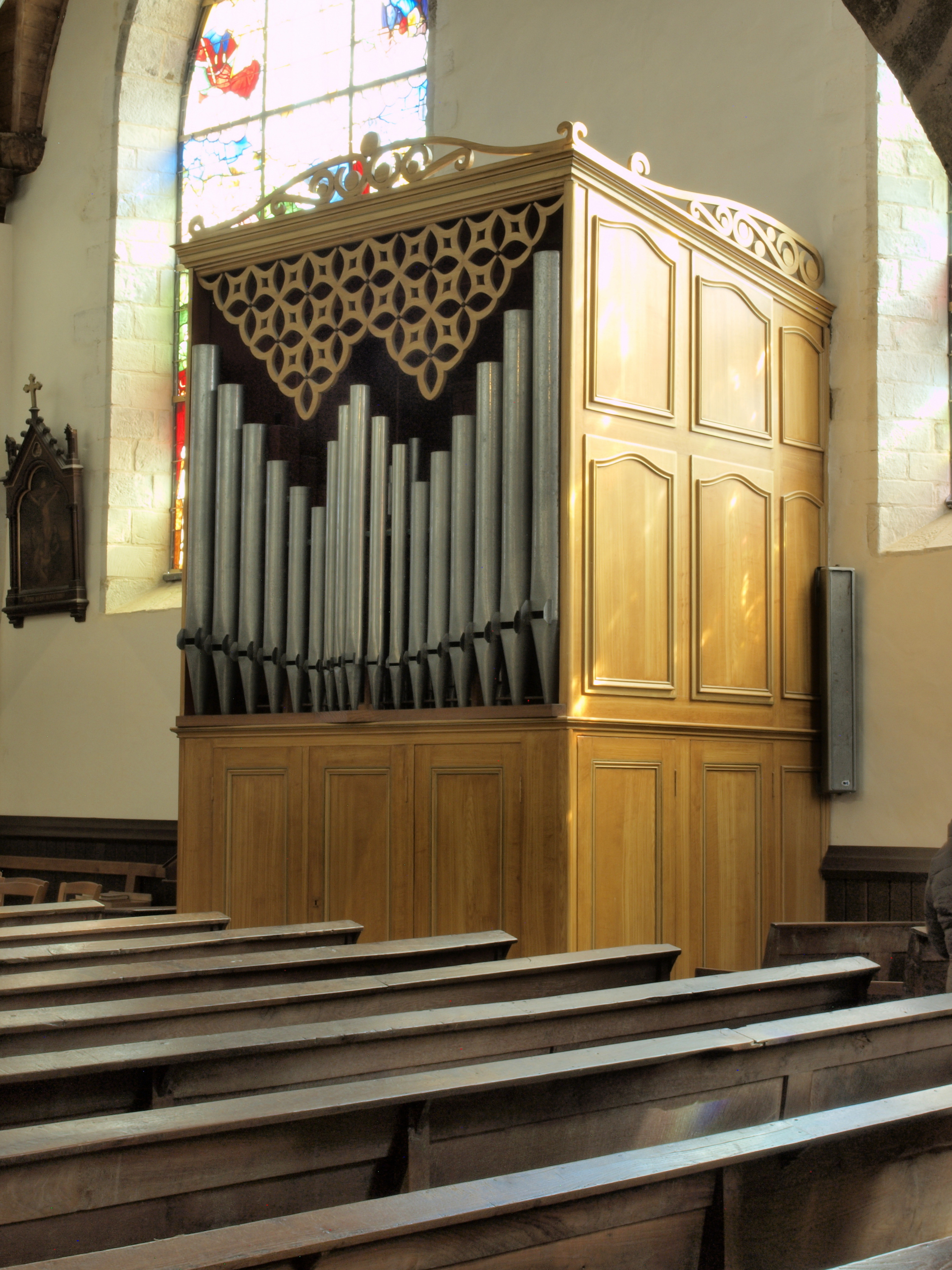 Église Saint-Patern de Louvigné-de-Bais (Ille-et-Vilaine, France)